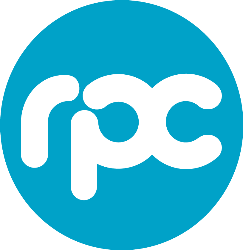 Logotipo de la Red Paraguaya de Comunicación, iniciando una etapa de cambio en el canal.